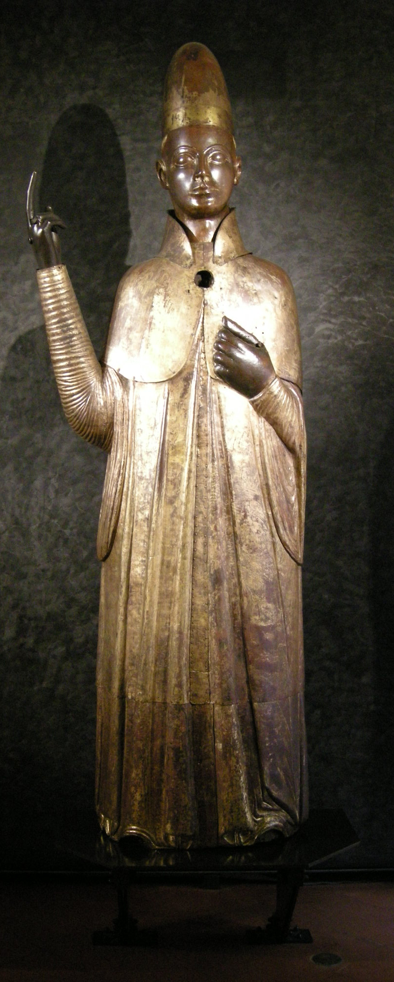 Manno Bandini da Siena, Bonifacio VIII. Rame battuto e bronzo fuso su anima in legno, nel Museo civico medievale a Bologna, inv. 1668.